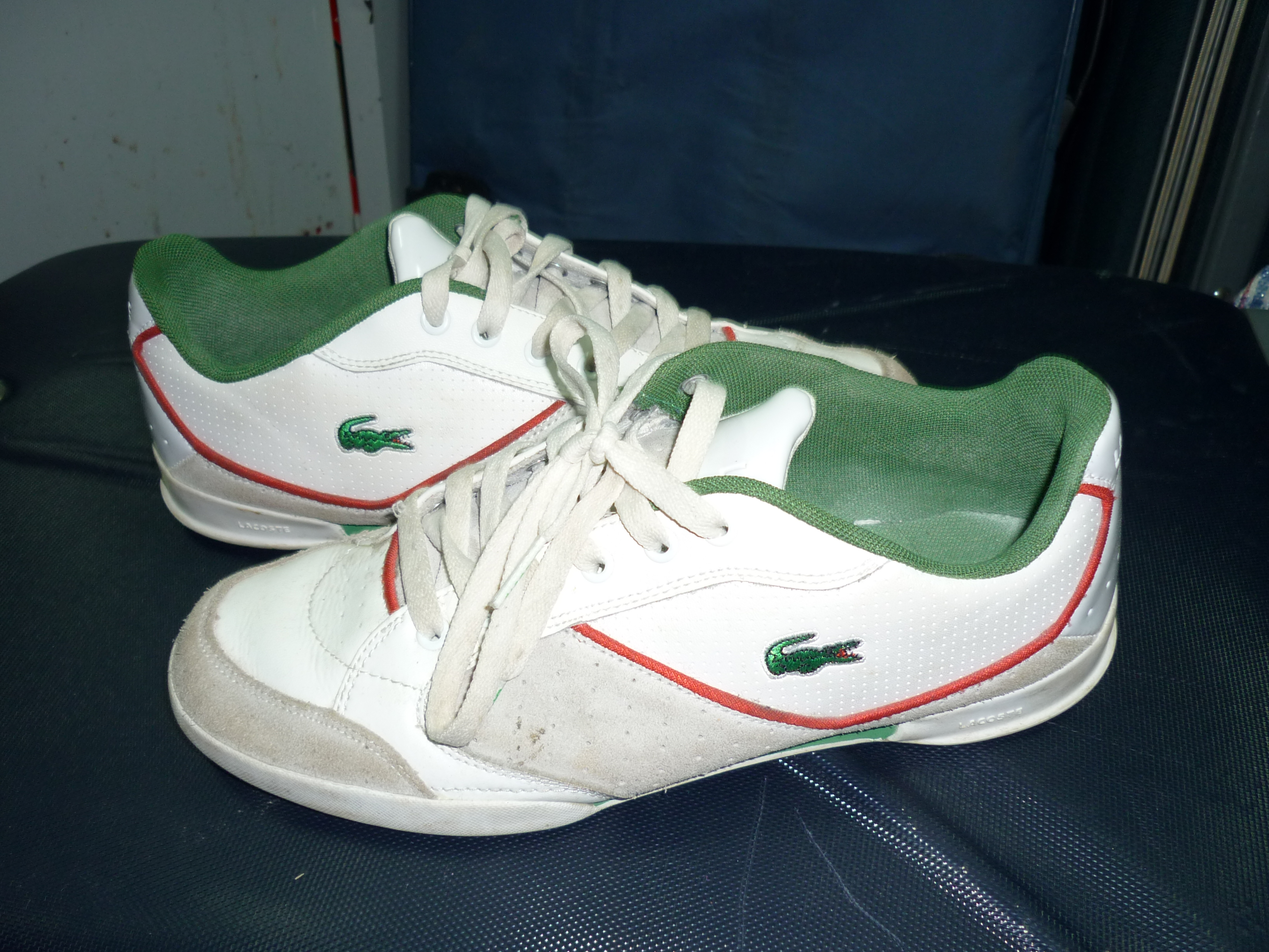 Un par de zapatillas